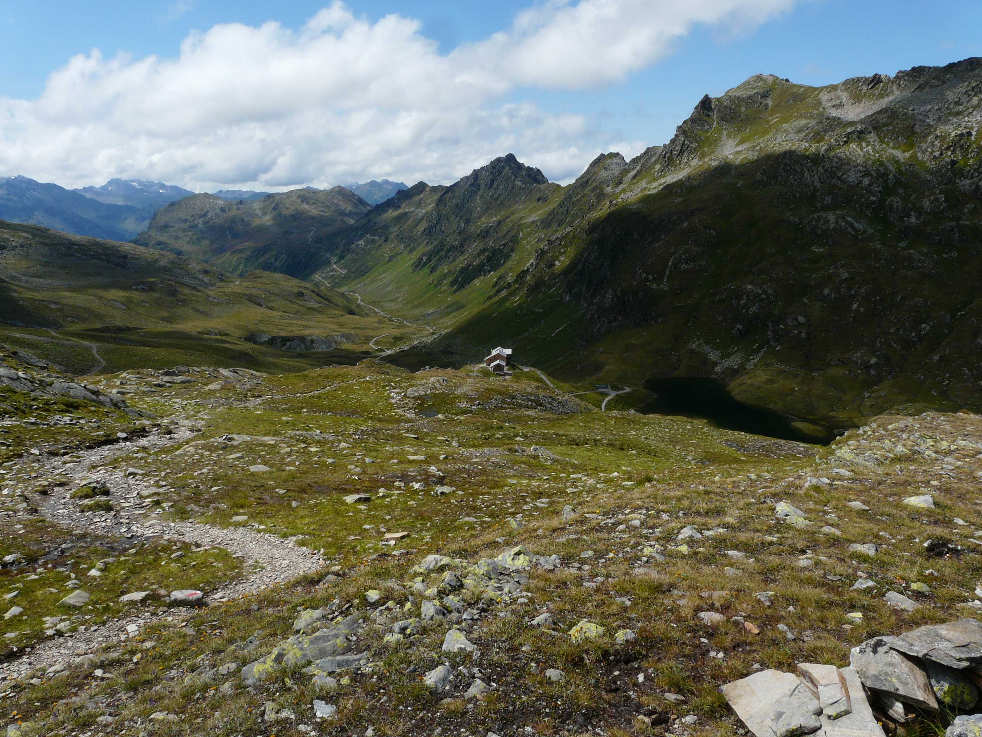 Blick zur Heilbronner Hütte mit Scheidseen, Verbellener Winterjöchle und Verbellatal